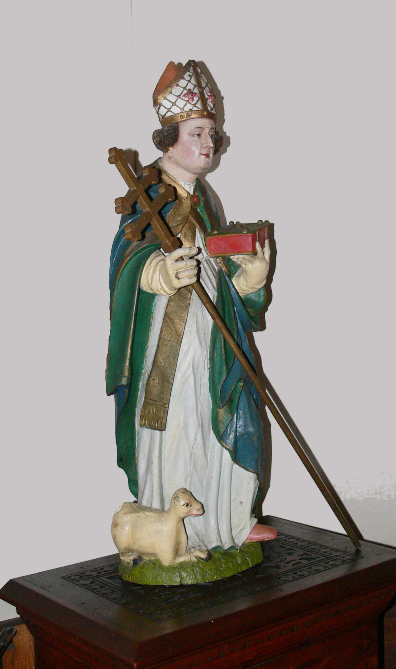 Schloss Wolfegg, Wolfegg, Landkreis Ravensburg, Baden-Württemberg Statue eines hl. Bischofs (Hl. Lantpert von Freising?)